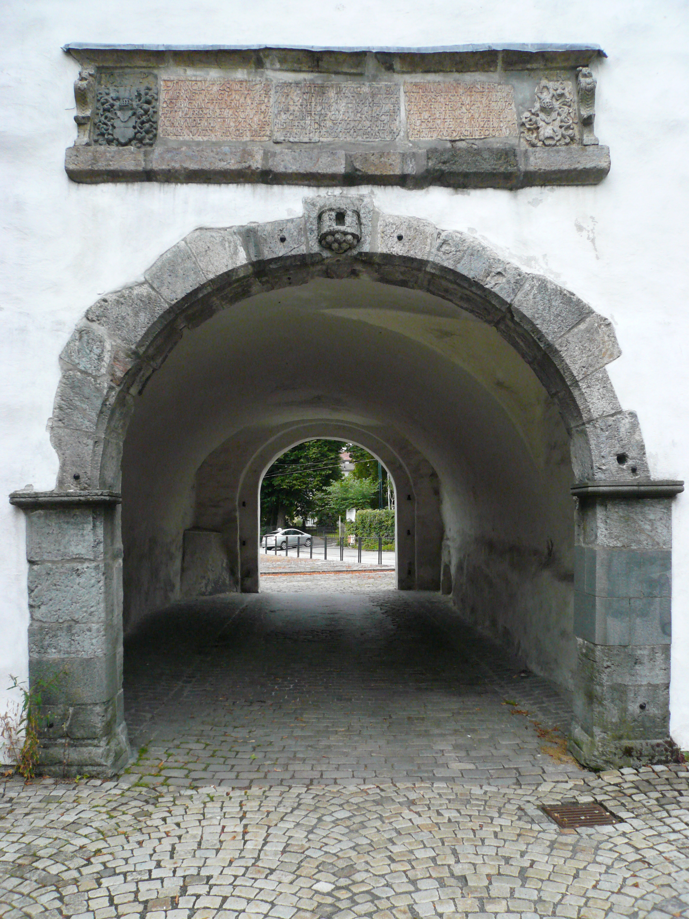 Stadsportens klebersteinsdetaljering